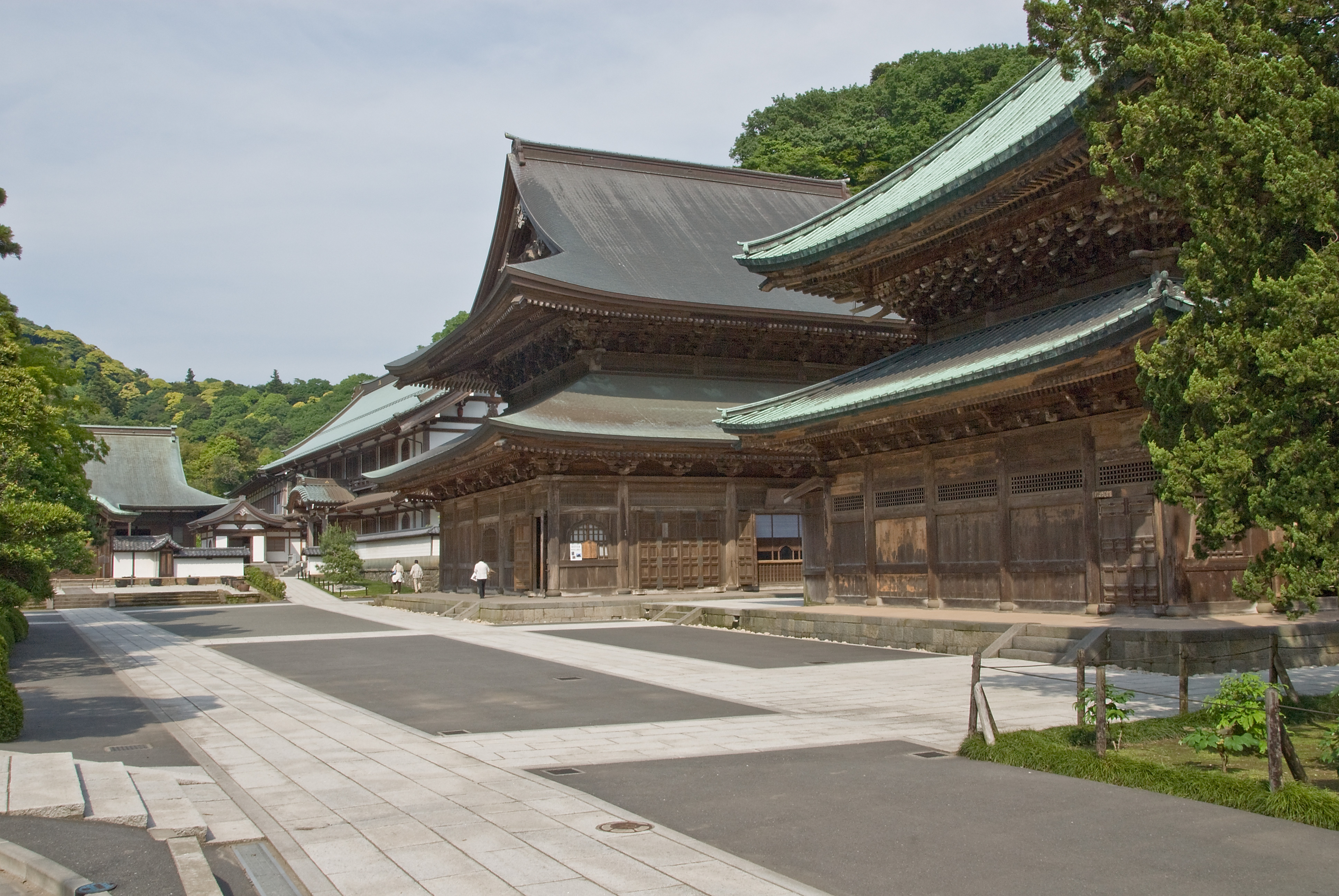 The garan at Kencho-ji, Kamakura